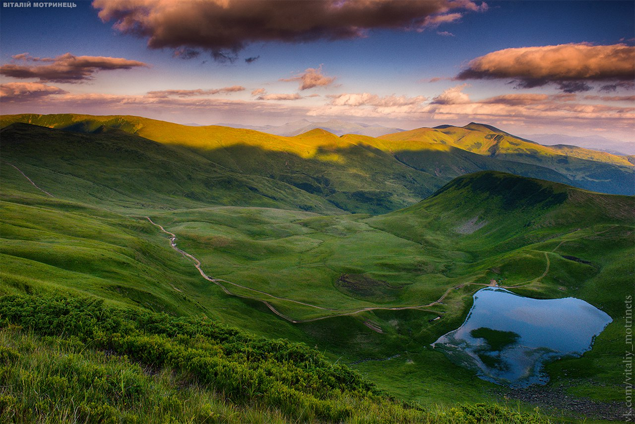 Озеро Догяска. Вид з Хребта